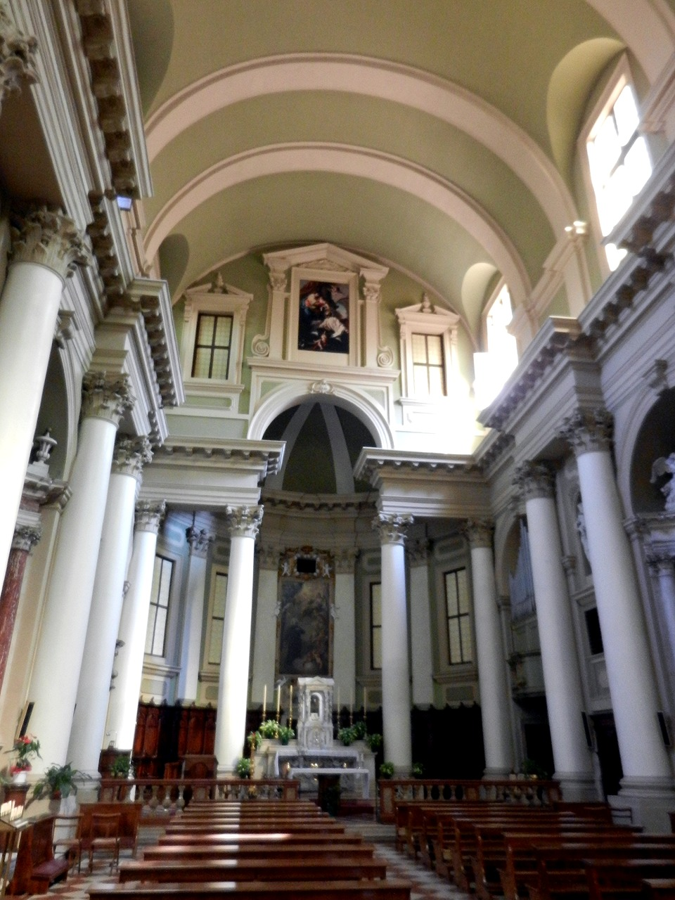 Vicenza - Interno della Chiesa di S. Gaetano